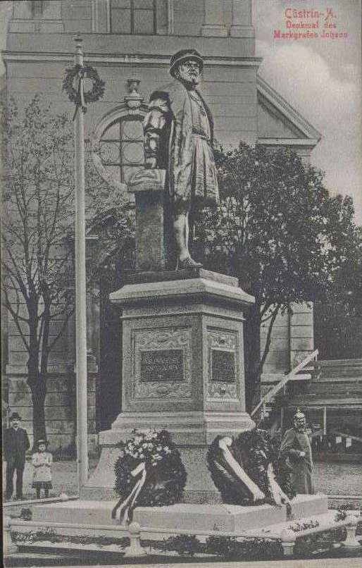 Küstrin Denkmal für Markgraf Johann, Bildhauer Fritz Schaper